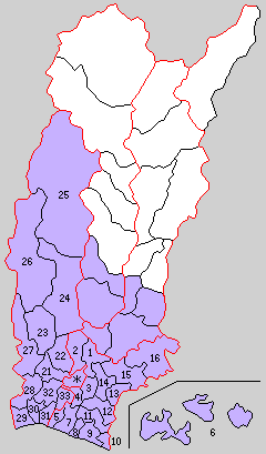 後の兵庫県飾磨郡域の町村制時点の町村。